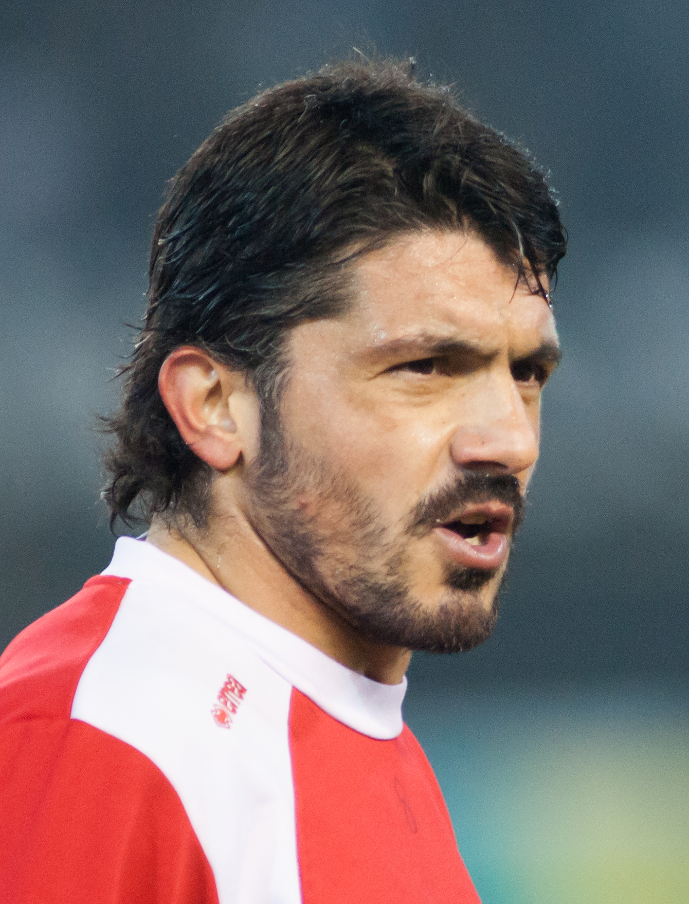 Lausanne vs Sion 27 february 2013 - Gennaro Gattuso